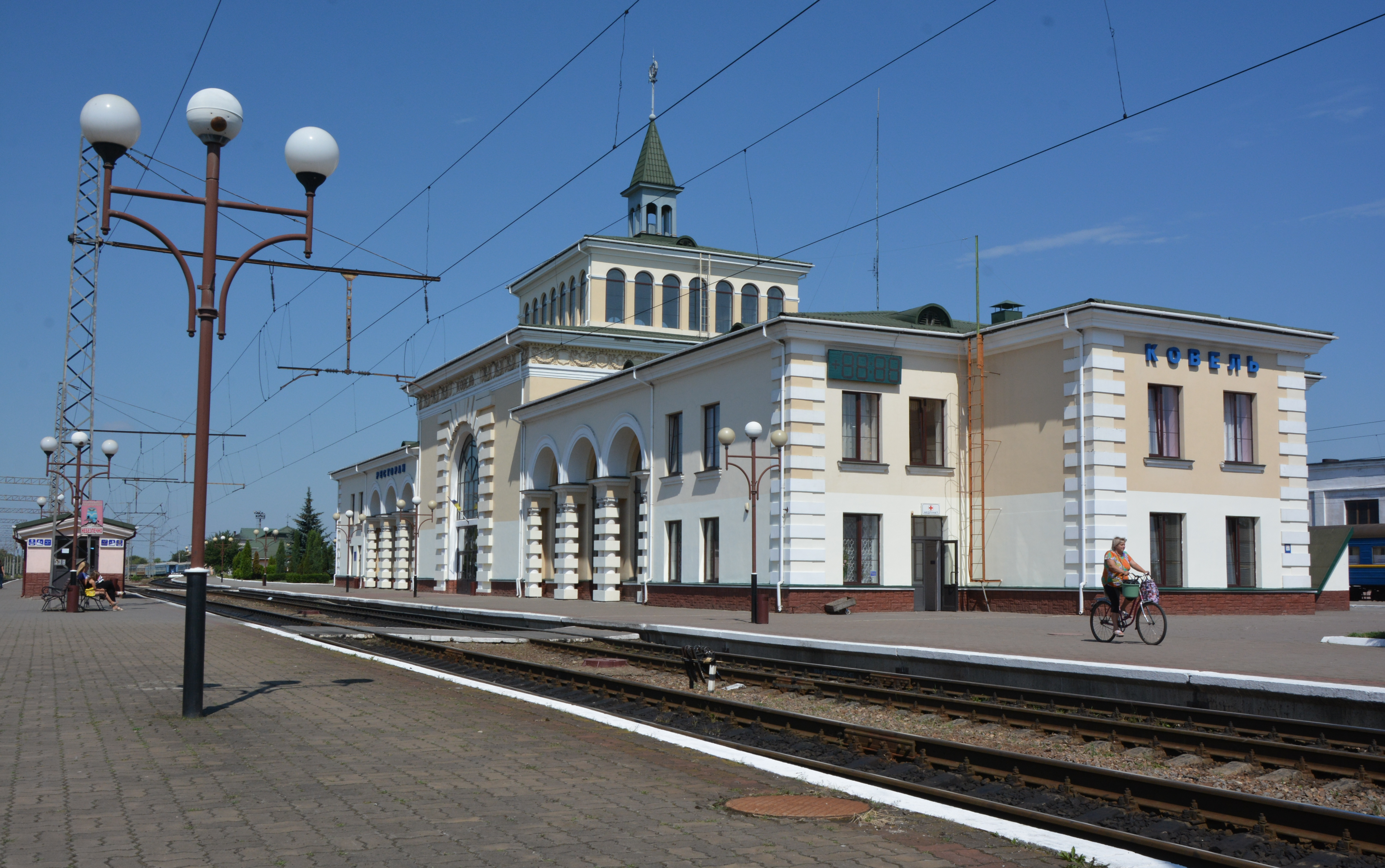 Залізничний вокзал (мур.), Ковель, вул. Привокзальна, 1